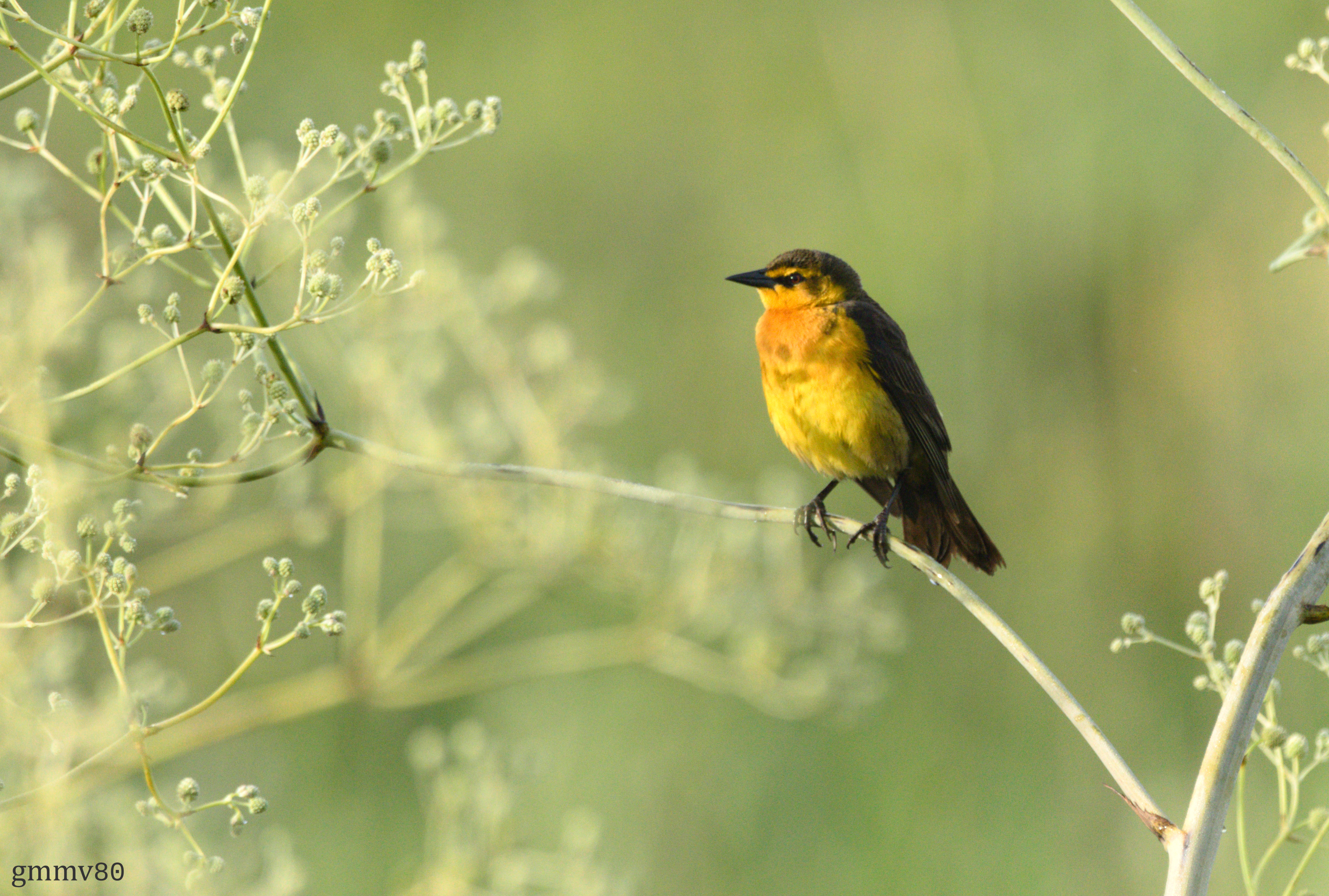 Hembra de Dragón, Tordo Amarillo o Chopî Sa'yju en el Complejo Guyra Retâ, comprendido dentro de la Reserva para Parque Nacional San Rafael, sudeste de la República del Paraguay.